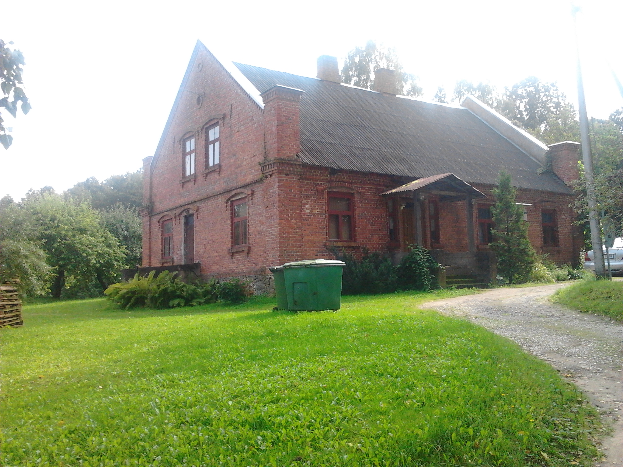 Juba mõisa peahoone